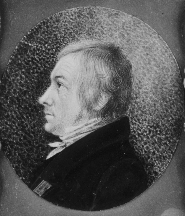 Tegning/akvarell utført av Johan Sebastian Welhaven ca. 1823. Størrelse/ Format: 8 x 7,2 Johan Sebastian Welhaven var 16 år gammel da han laget portrettet av sin far presten Johan Ernst Welhaven. Reprofotograf: Væring 1965